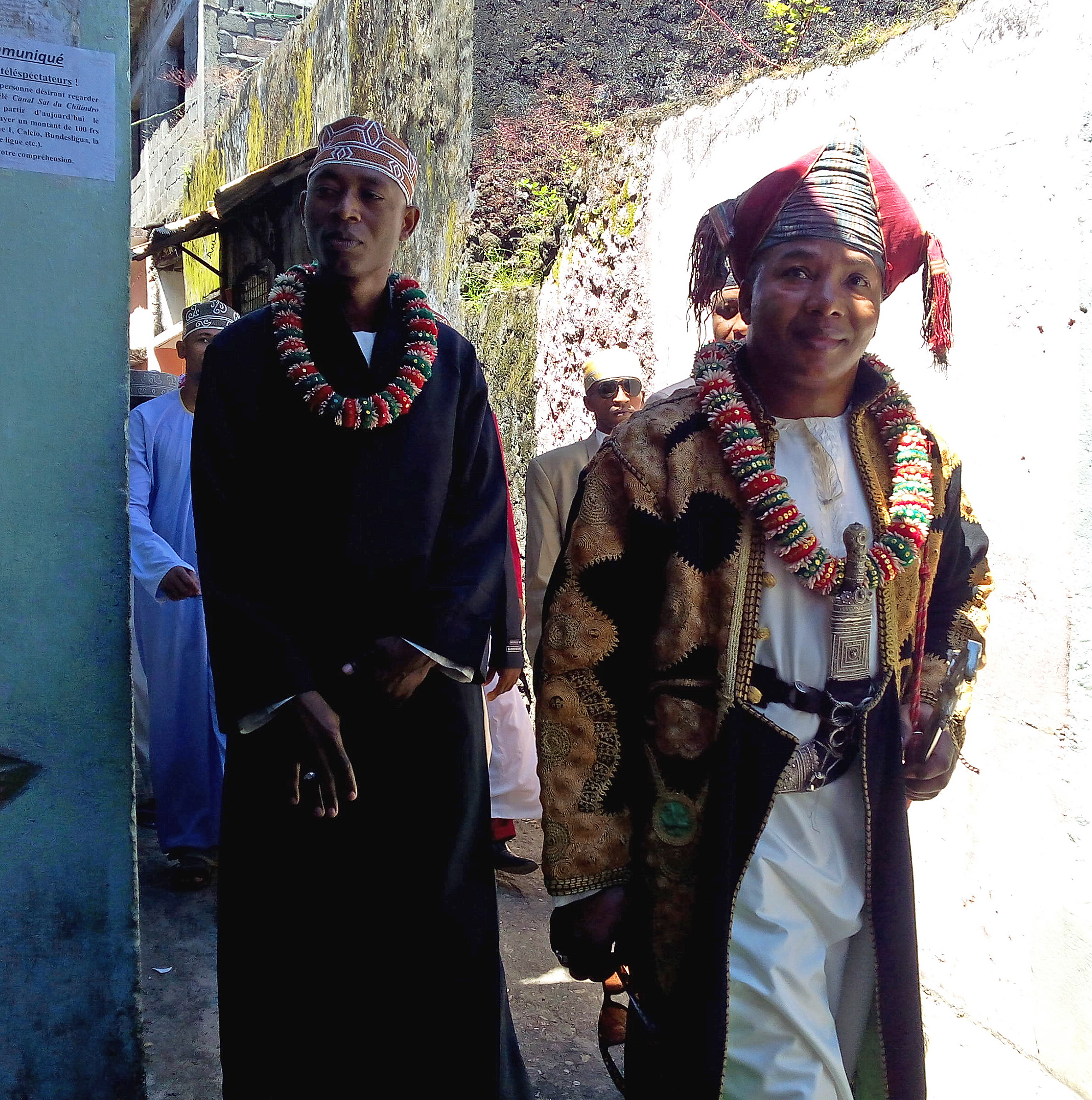 Tenue traditionnelle d'un homme se rendant à son mariage, croisé dans la medina de Domoni aux Comores This is an image of Cultural Fashion or Adornment from Comoros